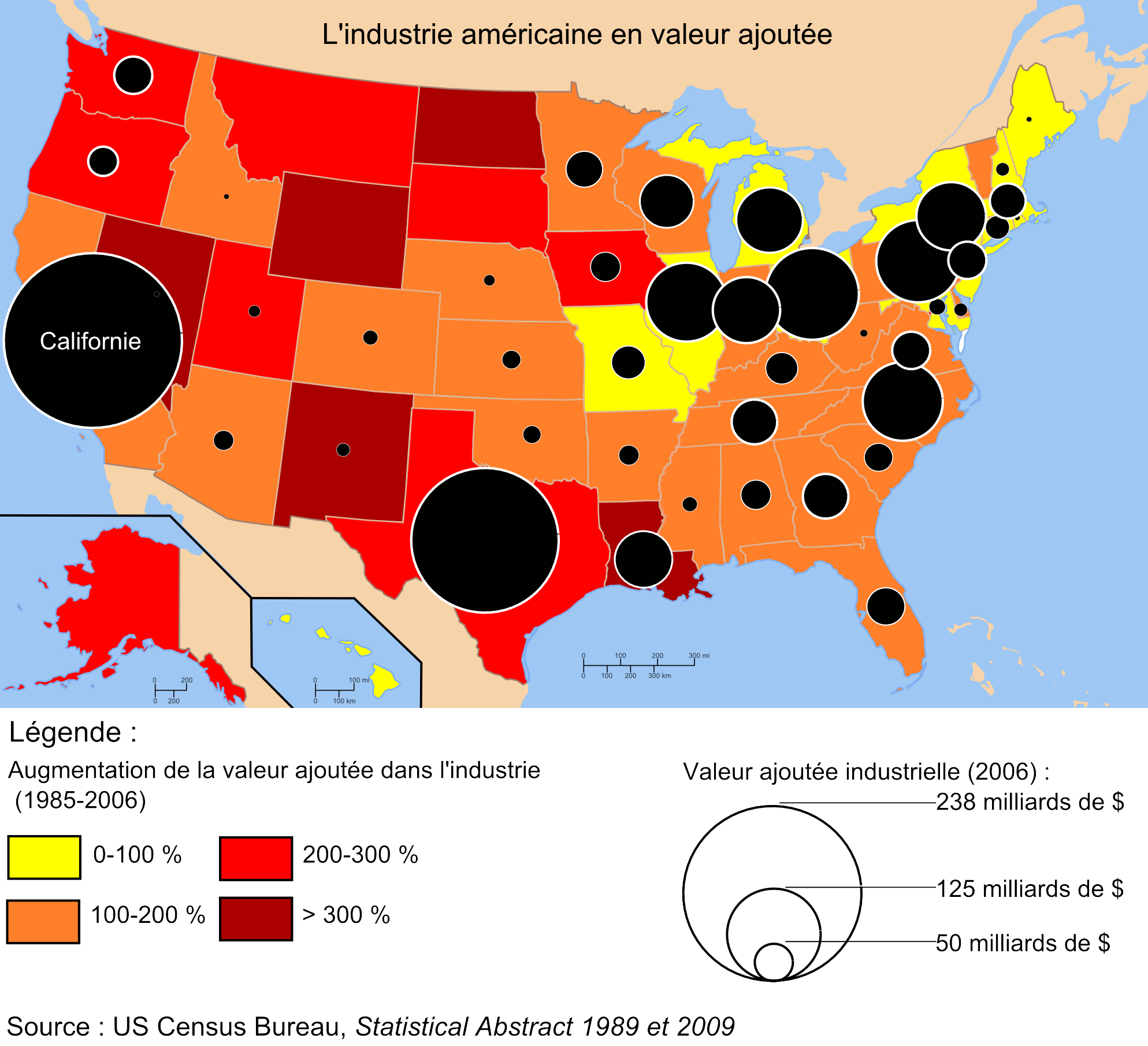 Carte de la valeur ajoutée industrielle en 2006. Source : US Census Bureau